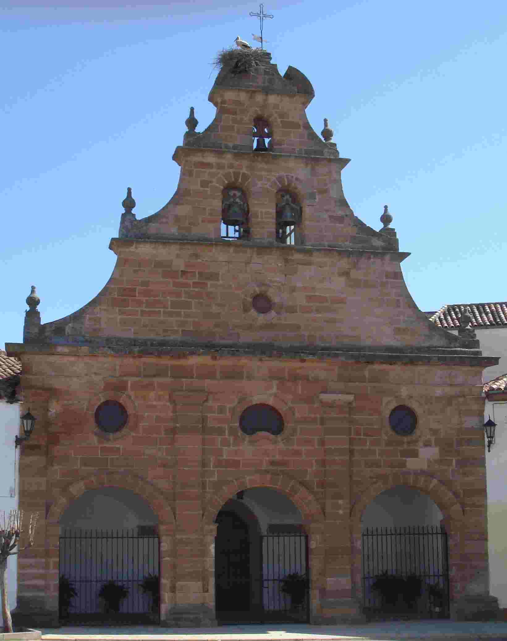 Iglesia de la Inmaculada (Navas de Tolosa)